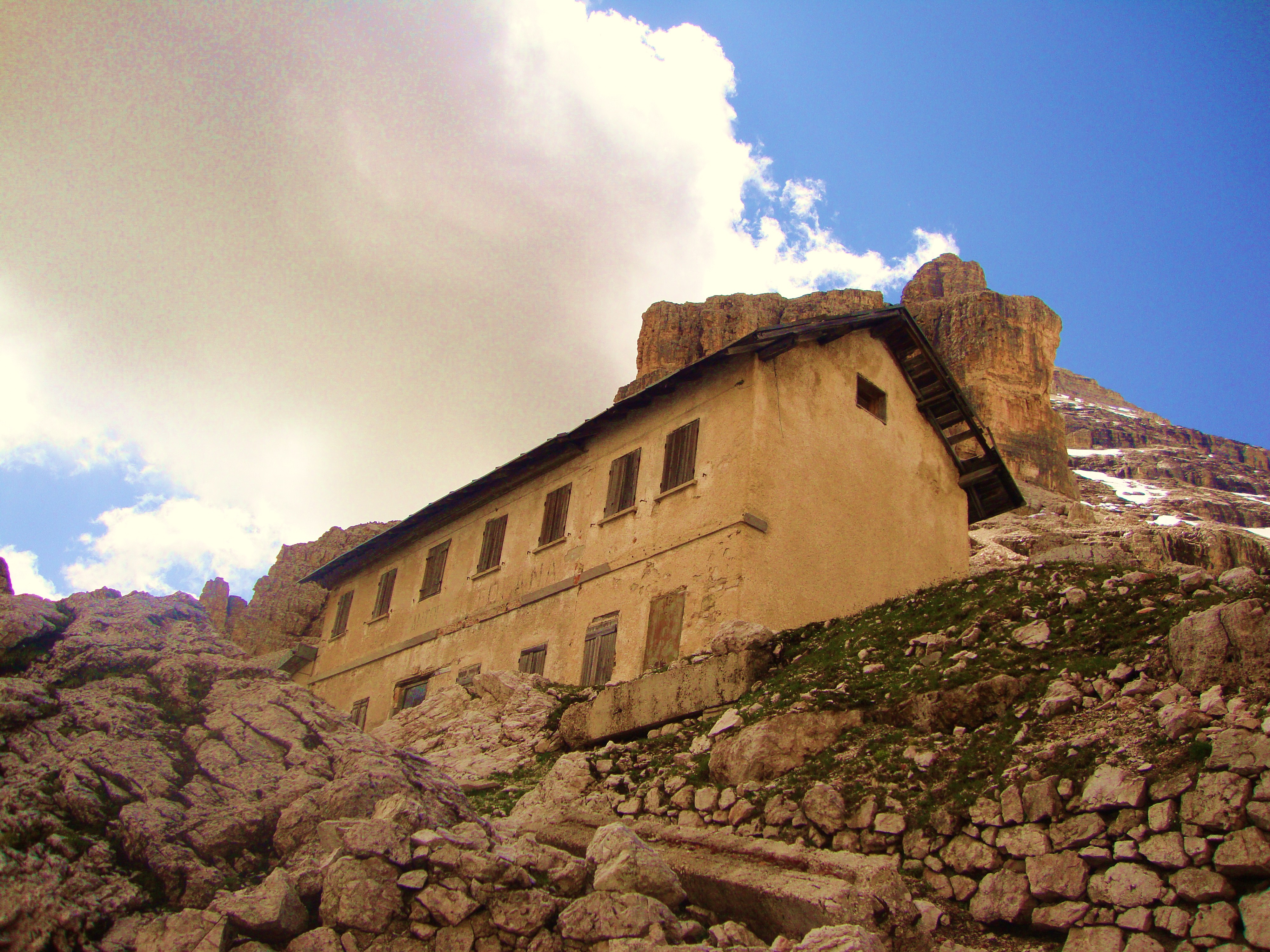 rifugio Cantore dismesso